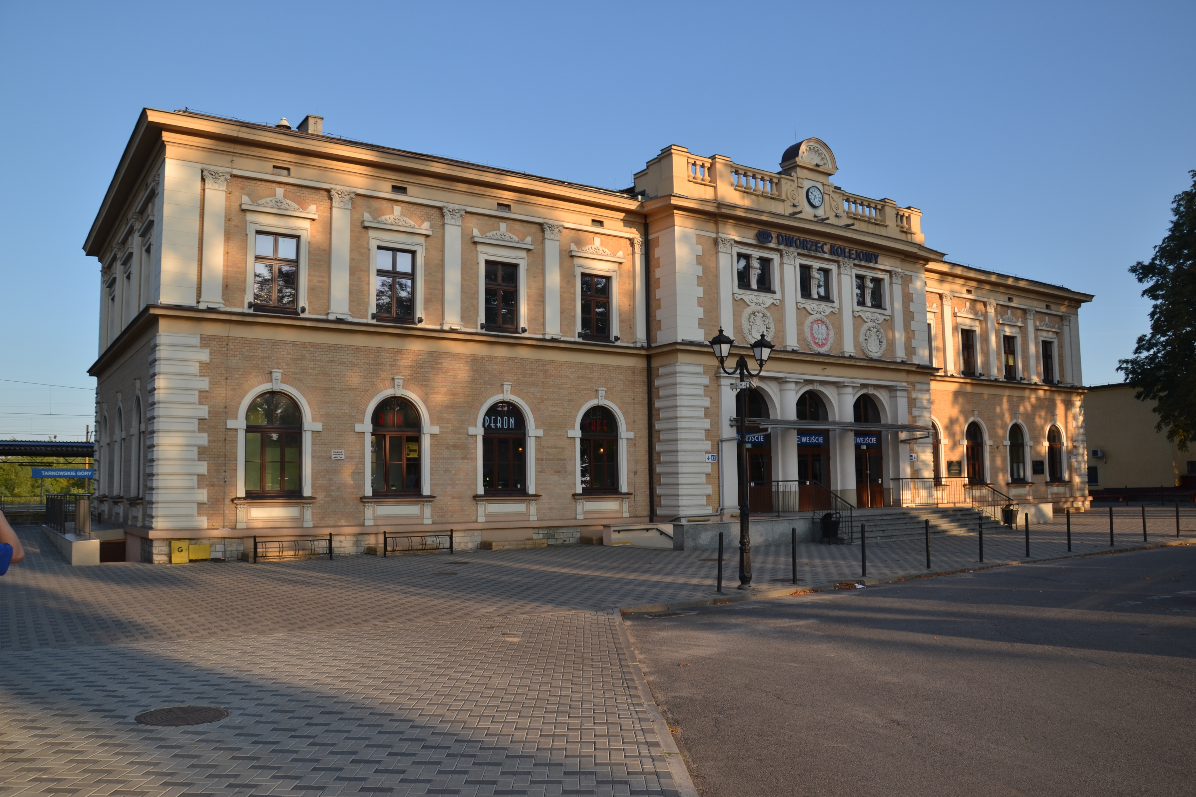 Widok dworca kolejowego w Tarnowskich Górach od strony miasta